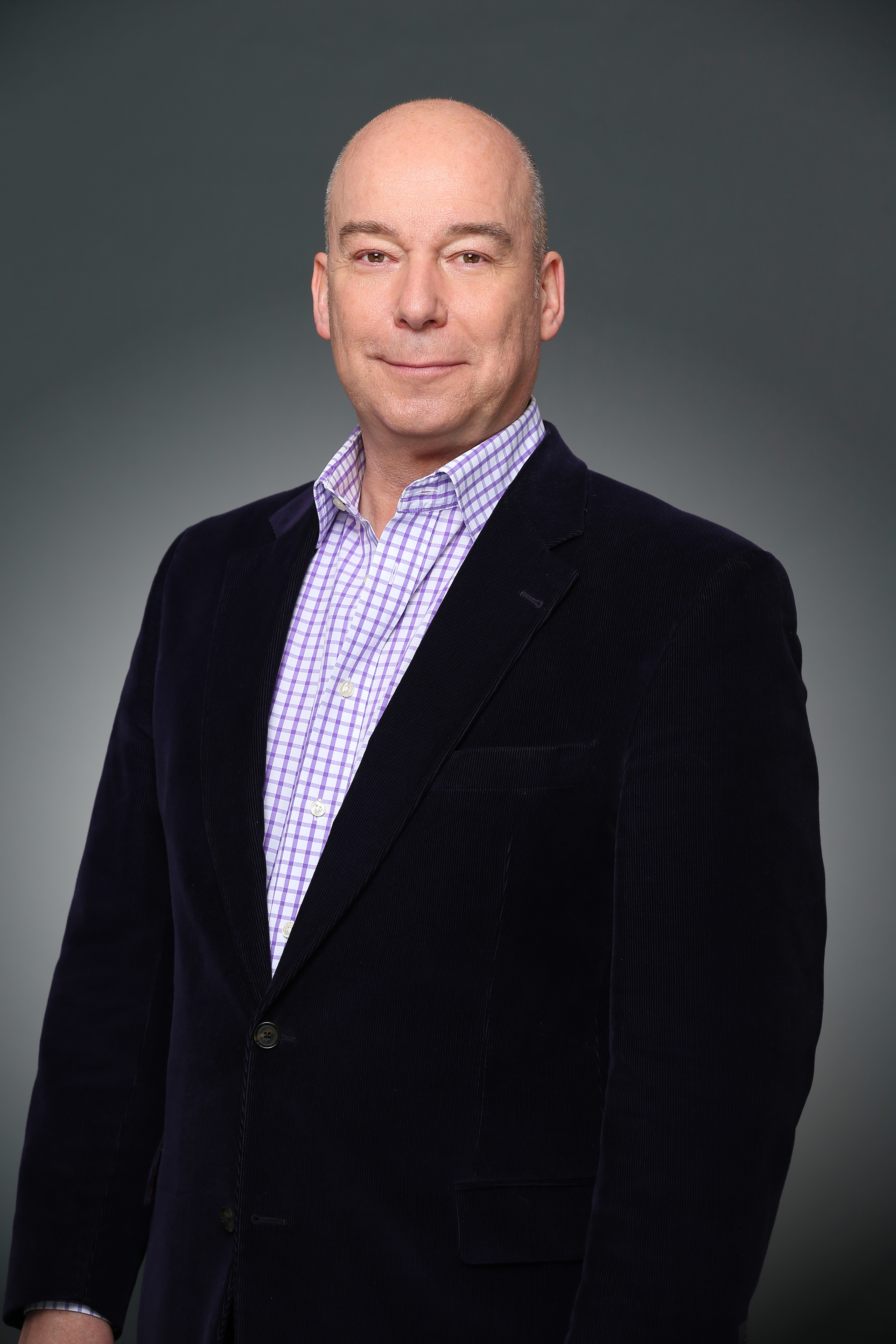 Prof. Jan Kromschröder